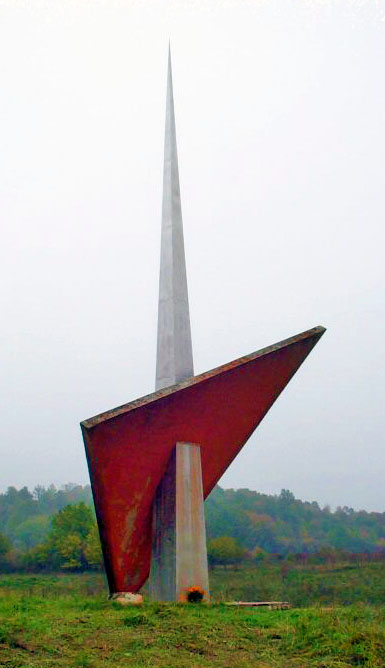 Споменик свим борцима Народноослободилачког рата и жртвама фашистичког терора села Слабиња. Споменик је откривен 30. маја 1981. године.